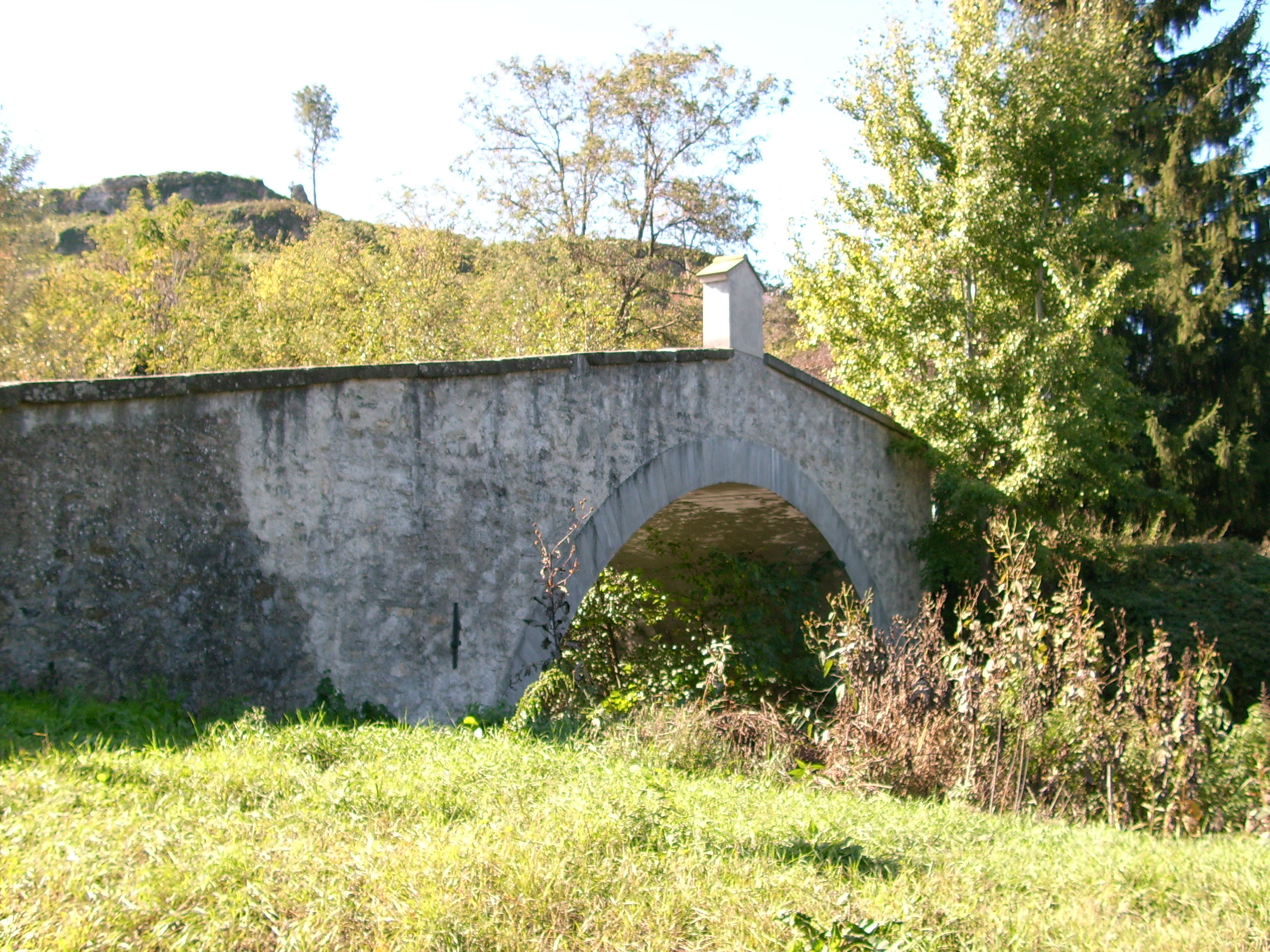 Ponte medievale presso Sassello, Liguria, Italia